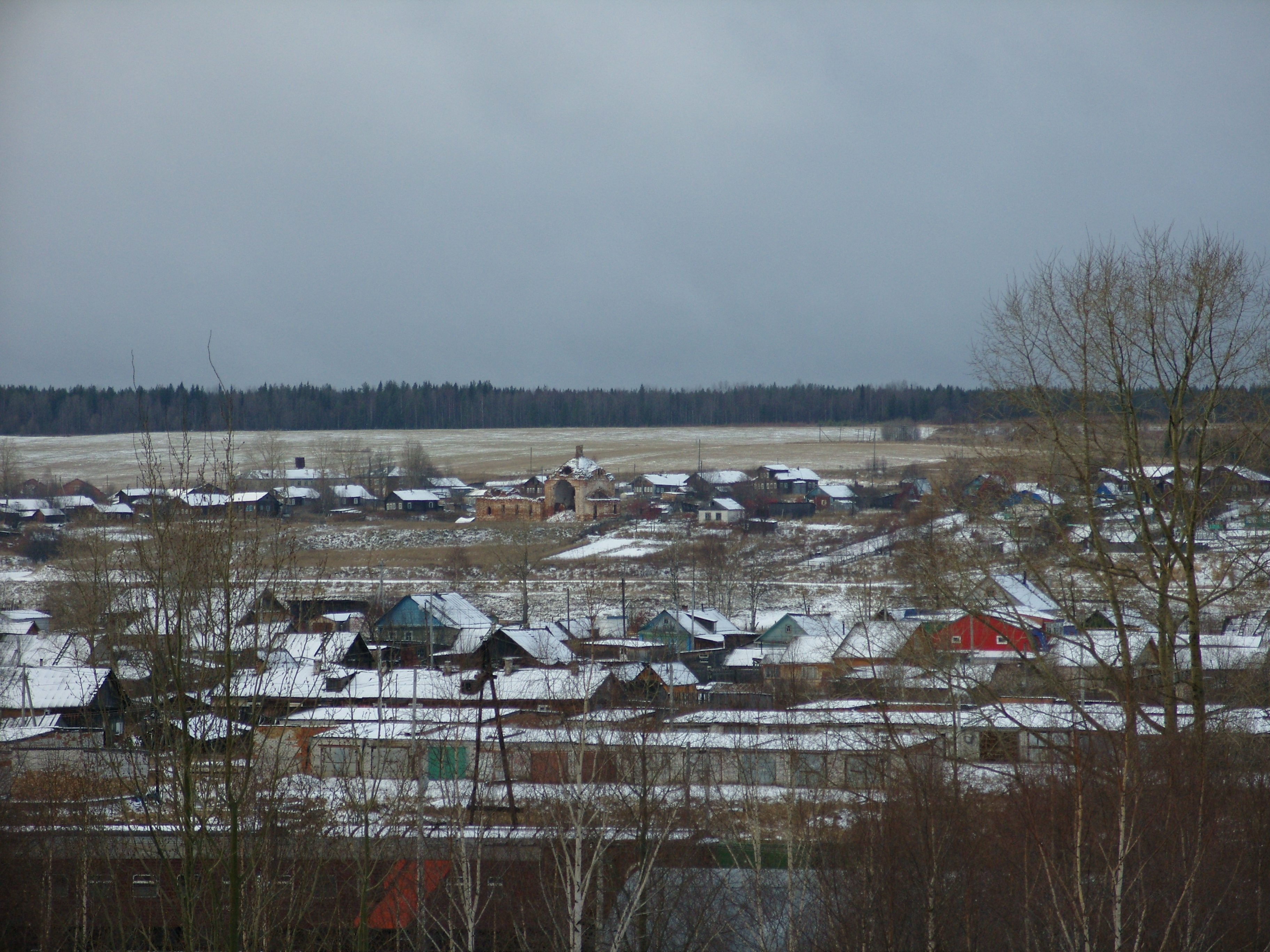 Емва с крыши школы №1